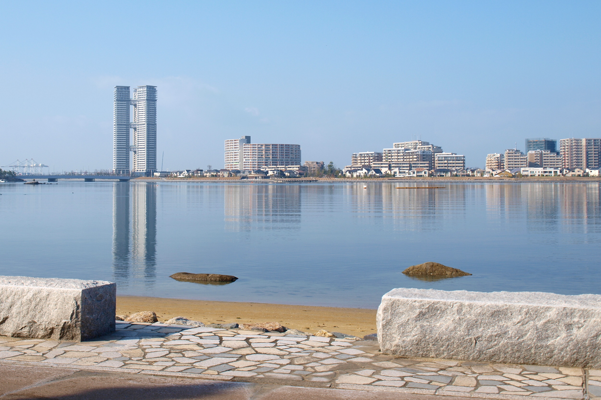 香椎浜よりアイランドシティを望む